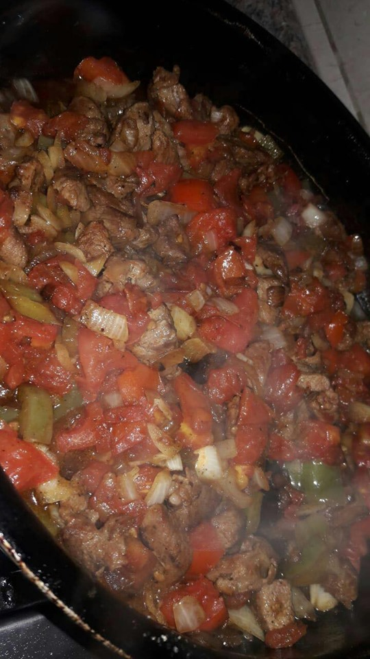 الصاجية من أكثر الأطباق الأردنية الشعبية التي تتكون من أنواع اللحوم والخصروات المختلفة التي يتم شوائها على الصاج